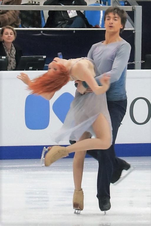 Тиффани Загорски / Джонатан Гурейро (Россия) на Чемпионате Европы по фигурному катанию 2018.